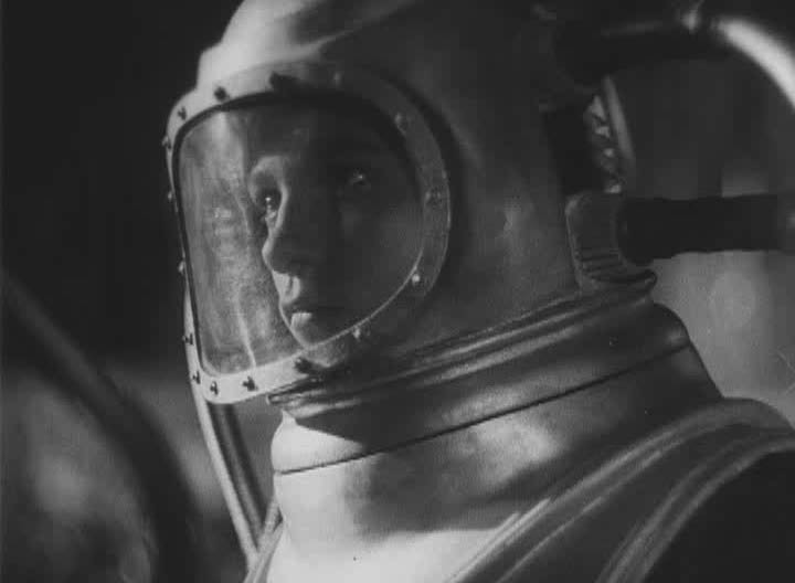 Кадр из фильма «Космический рейс»